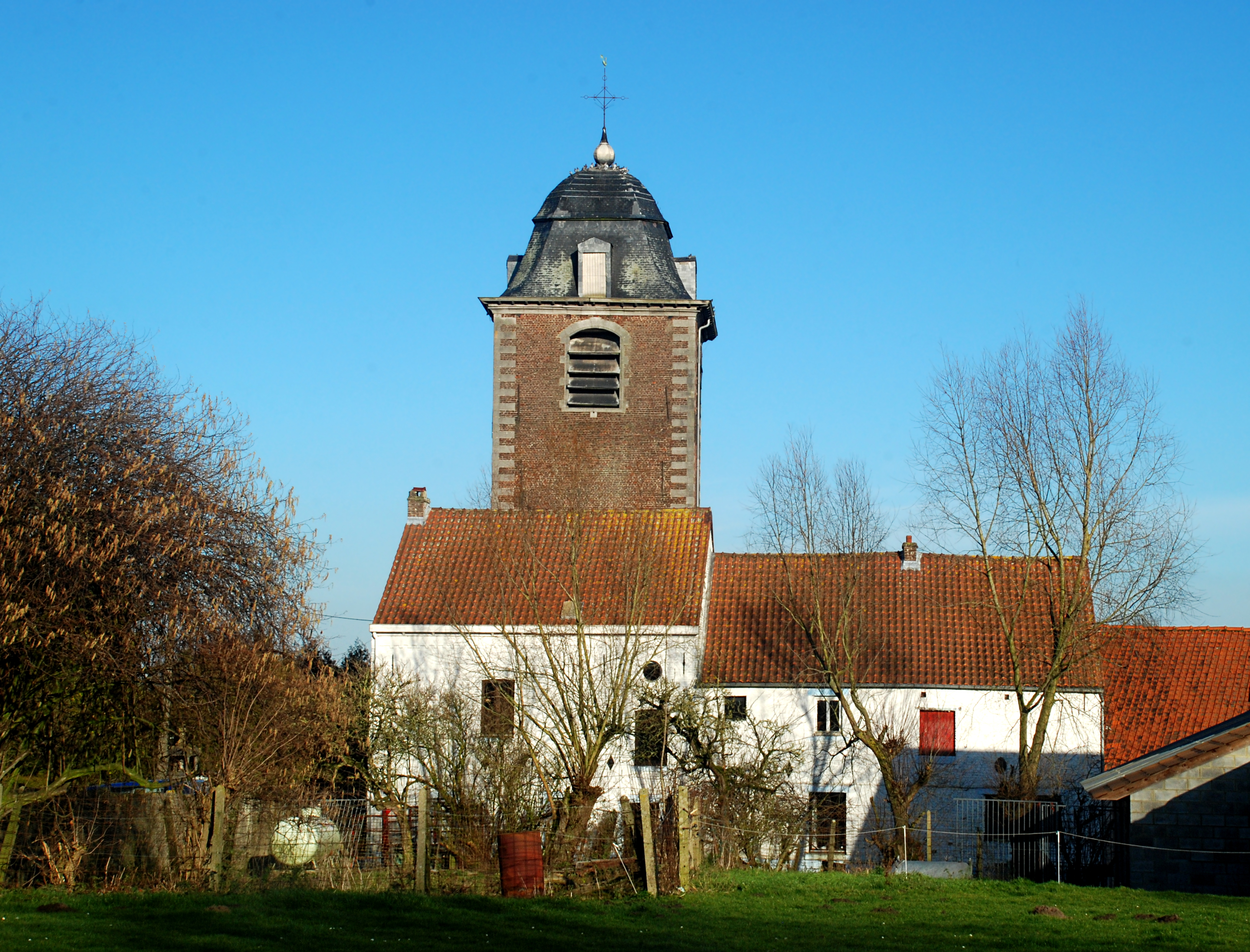 Belgique - Brabant wallon - Genappe - Baisy-Thy - Église Saint-Hubert